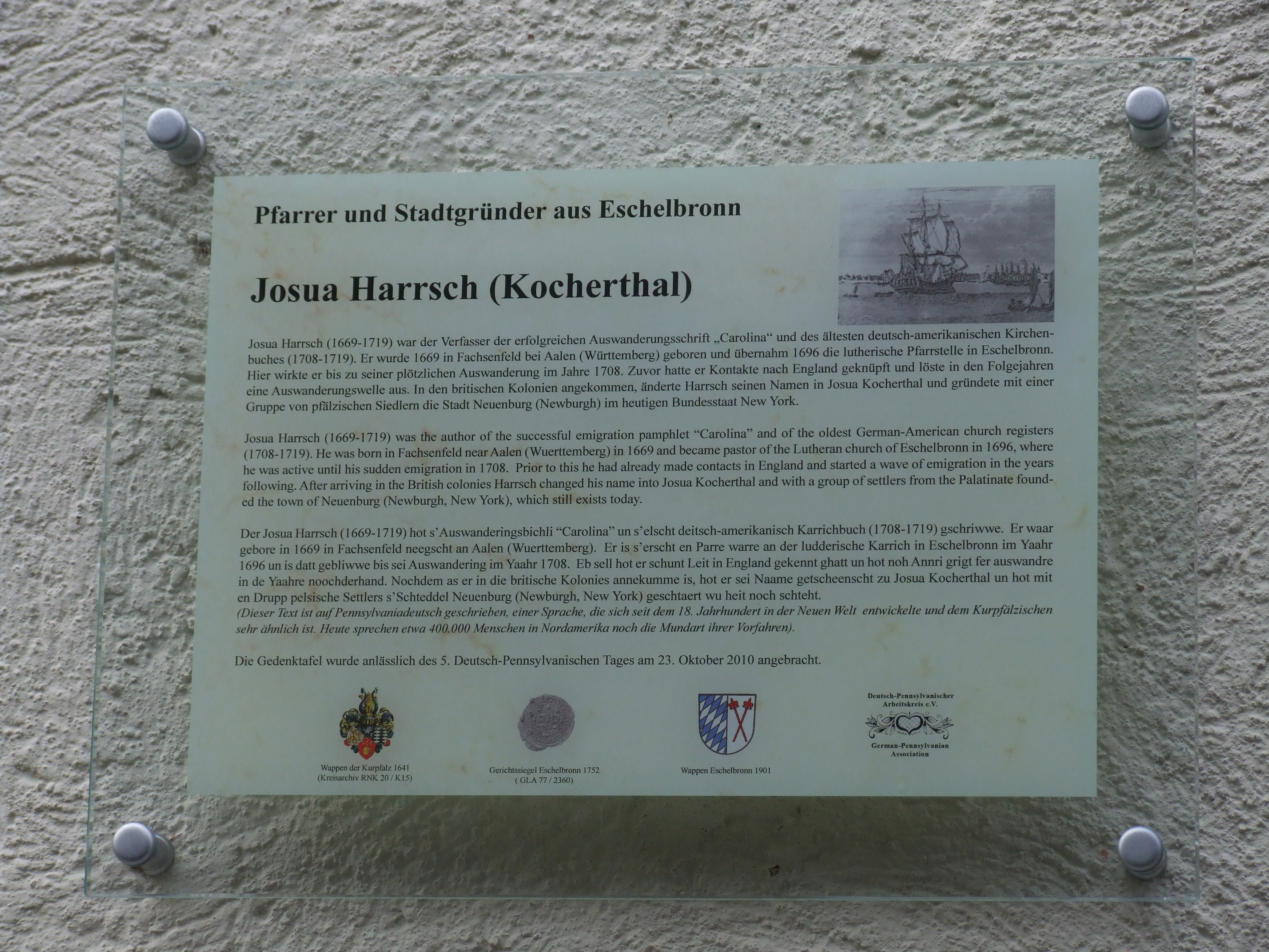 Infotafel an der Evangelischen Kirche in Eschelbronn